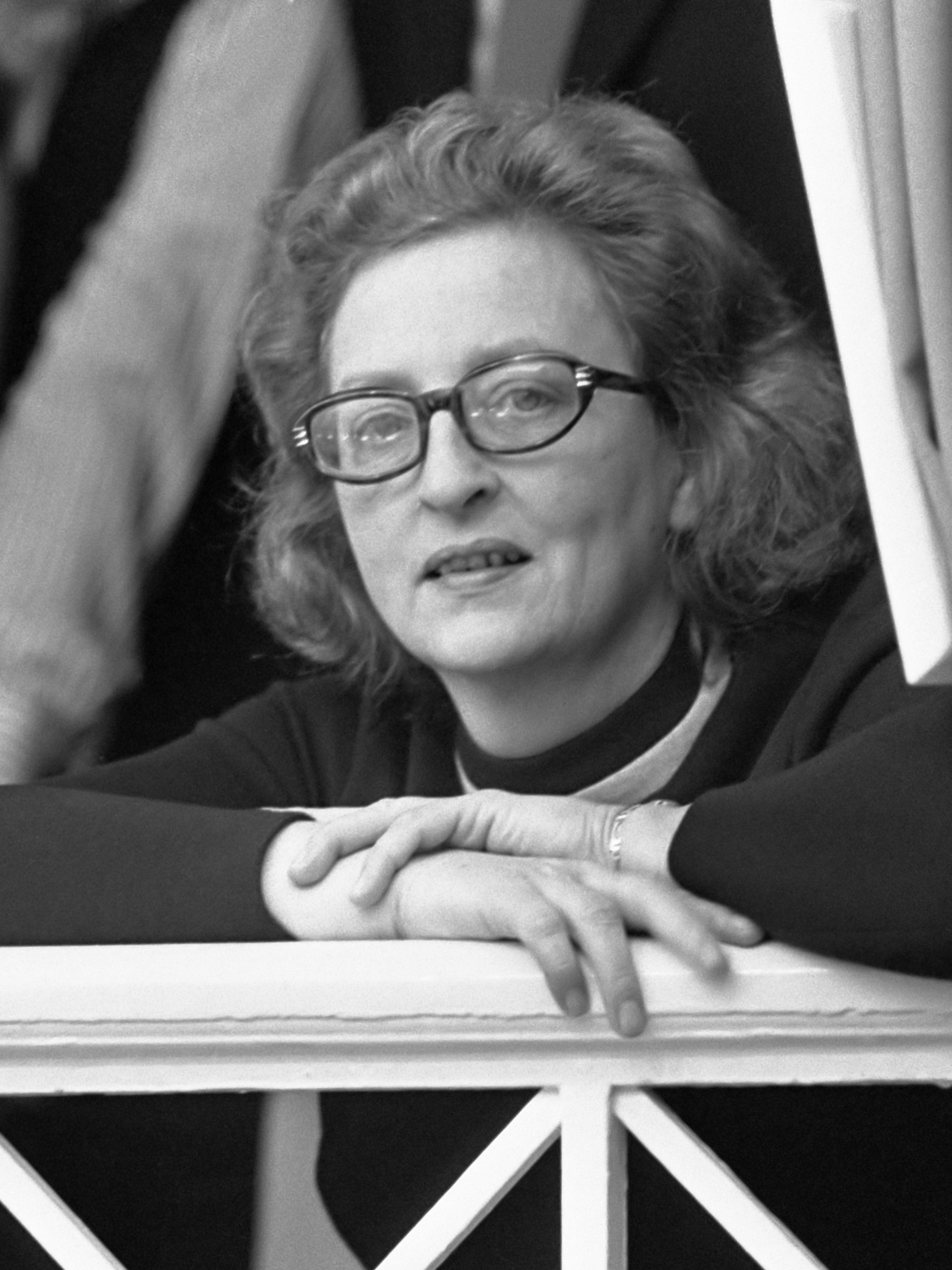 Mevrouw [Liesbeth] Den Uyl kijkt vanuit de loge toe bij de Algemene Beschouwingen in de Tweede Kamer 10 oktober 1973